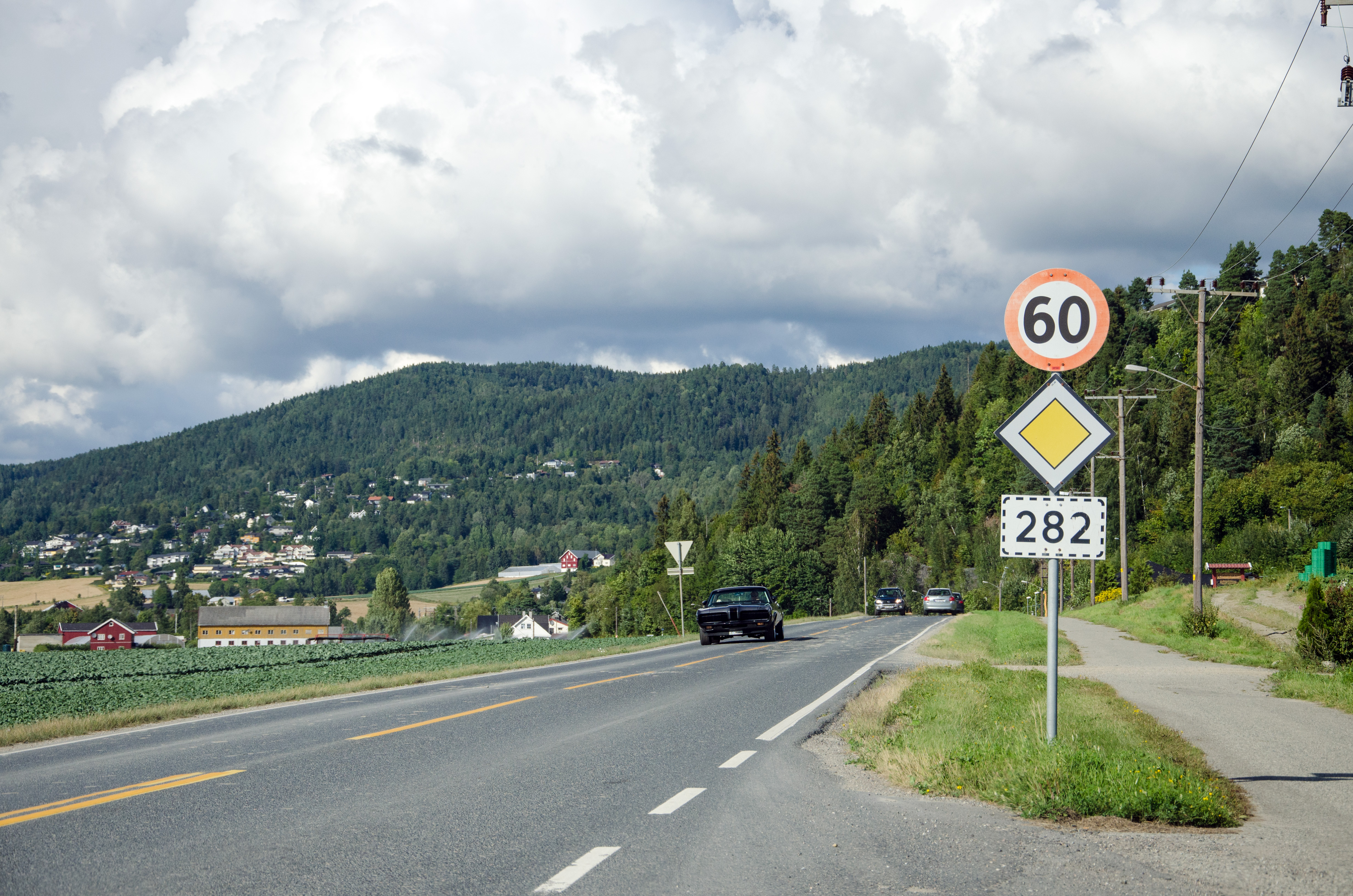 Fylkesvei 18 Tuverudveien